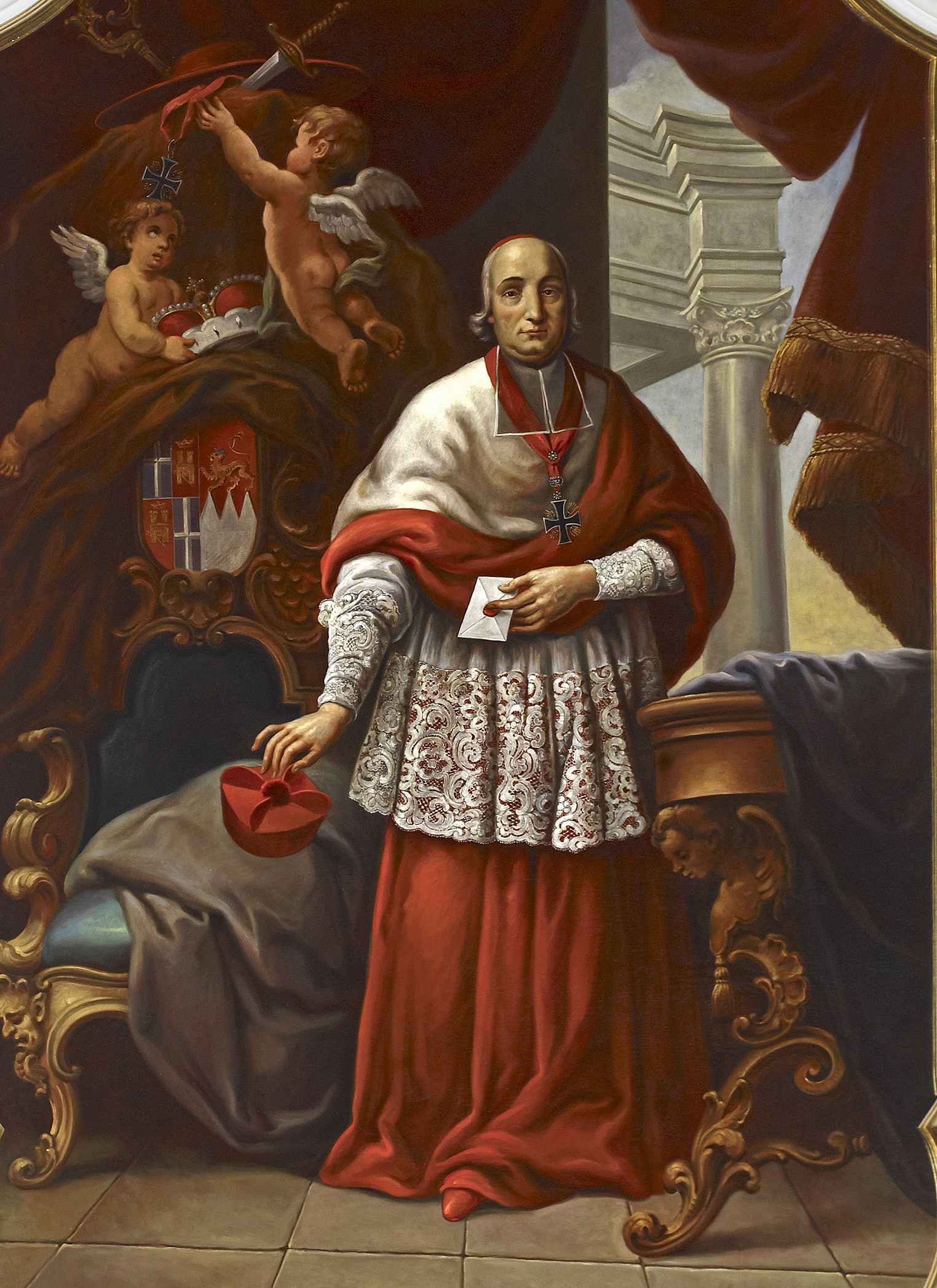 Kardinal Damian Hugo von Schönborn, Gemälde von Johannes Zick, Schloss Bruchsal